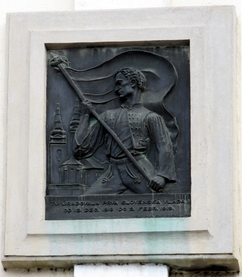 Pamätná tabuľa, 1.Šrobárova vláda; 1918-1919 Object location49° 13′ 30.17″ N, 18° 44′ 20.55″ E